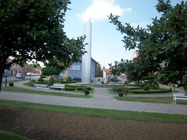 Grad Otok u Republici Hrvatskoj